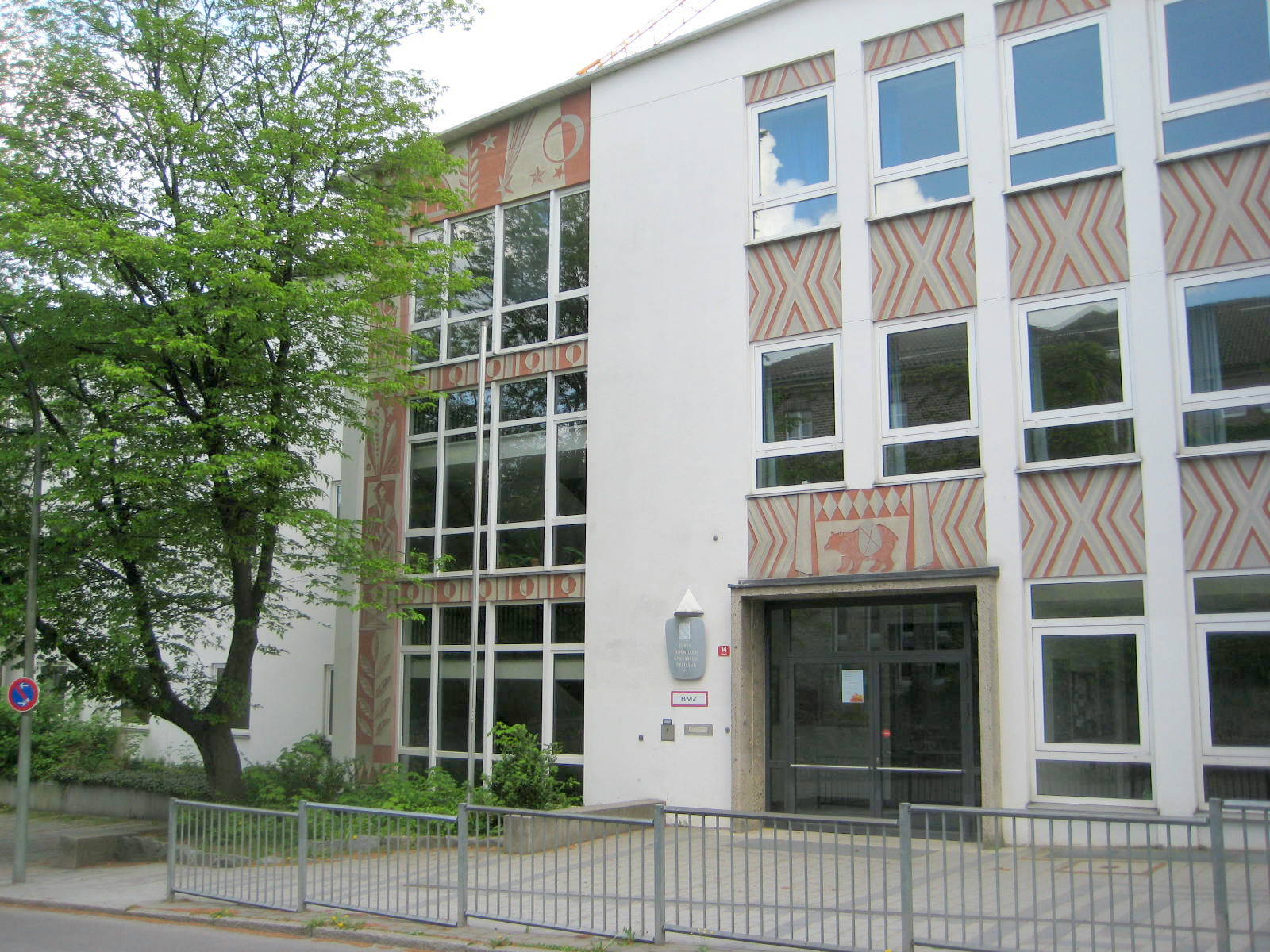 Freising, Josef-Hofmiller-Gymnasium von der Vimystraße her gesehen.